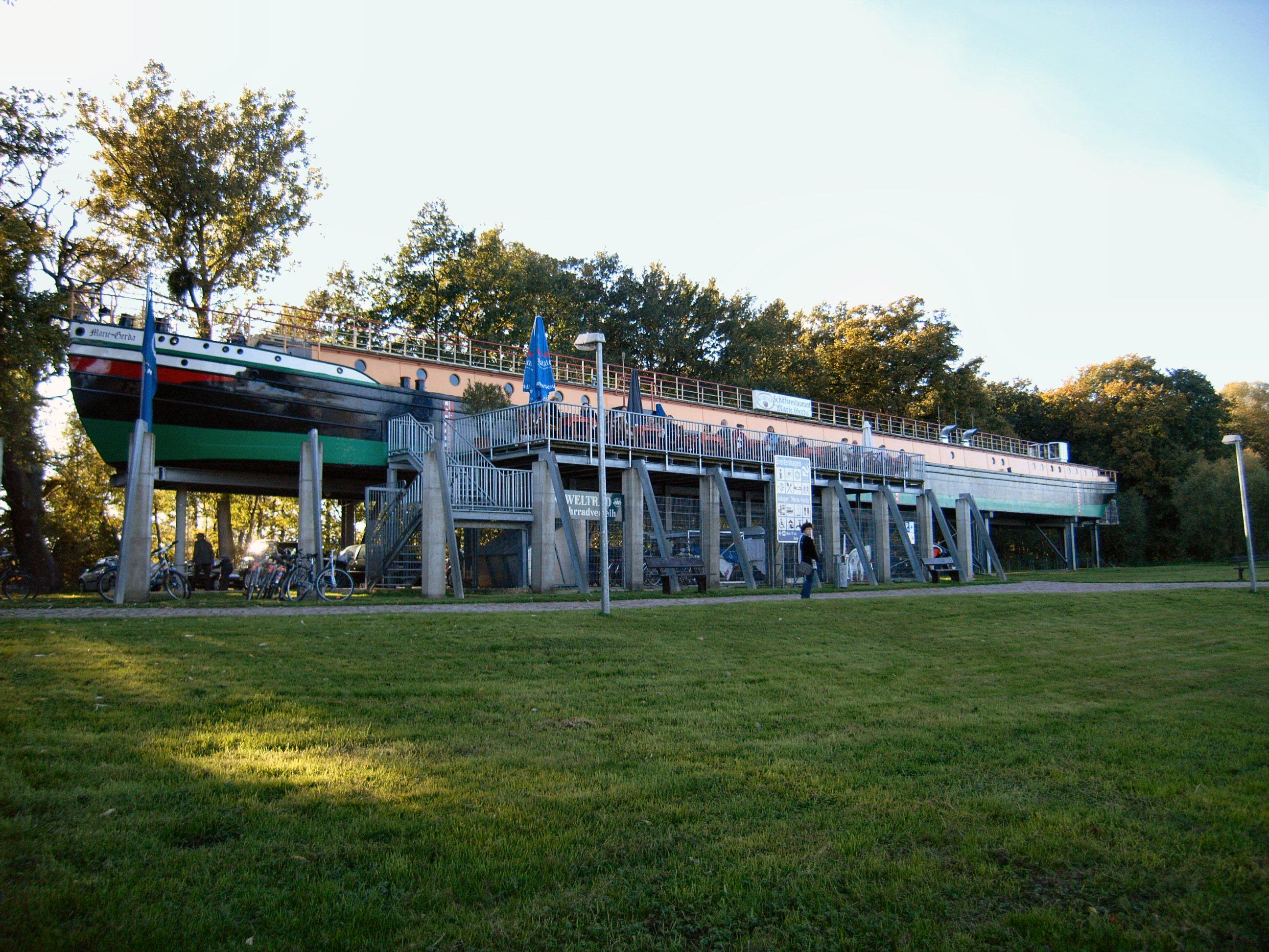 Breitenhagen,Museumsschiff Marie-Gerda